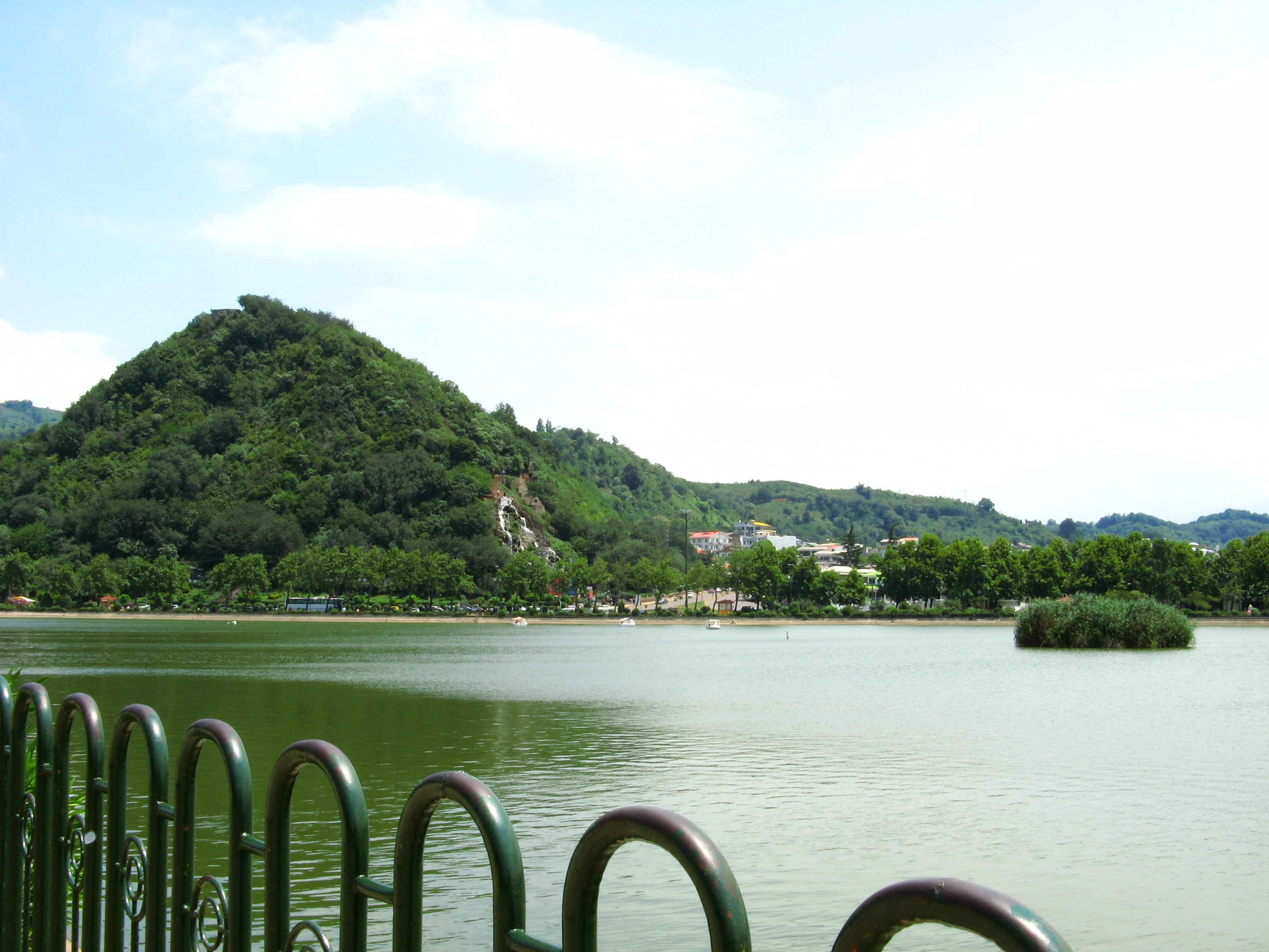 Lahijan, Iran